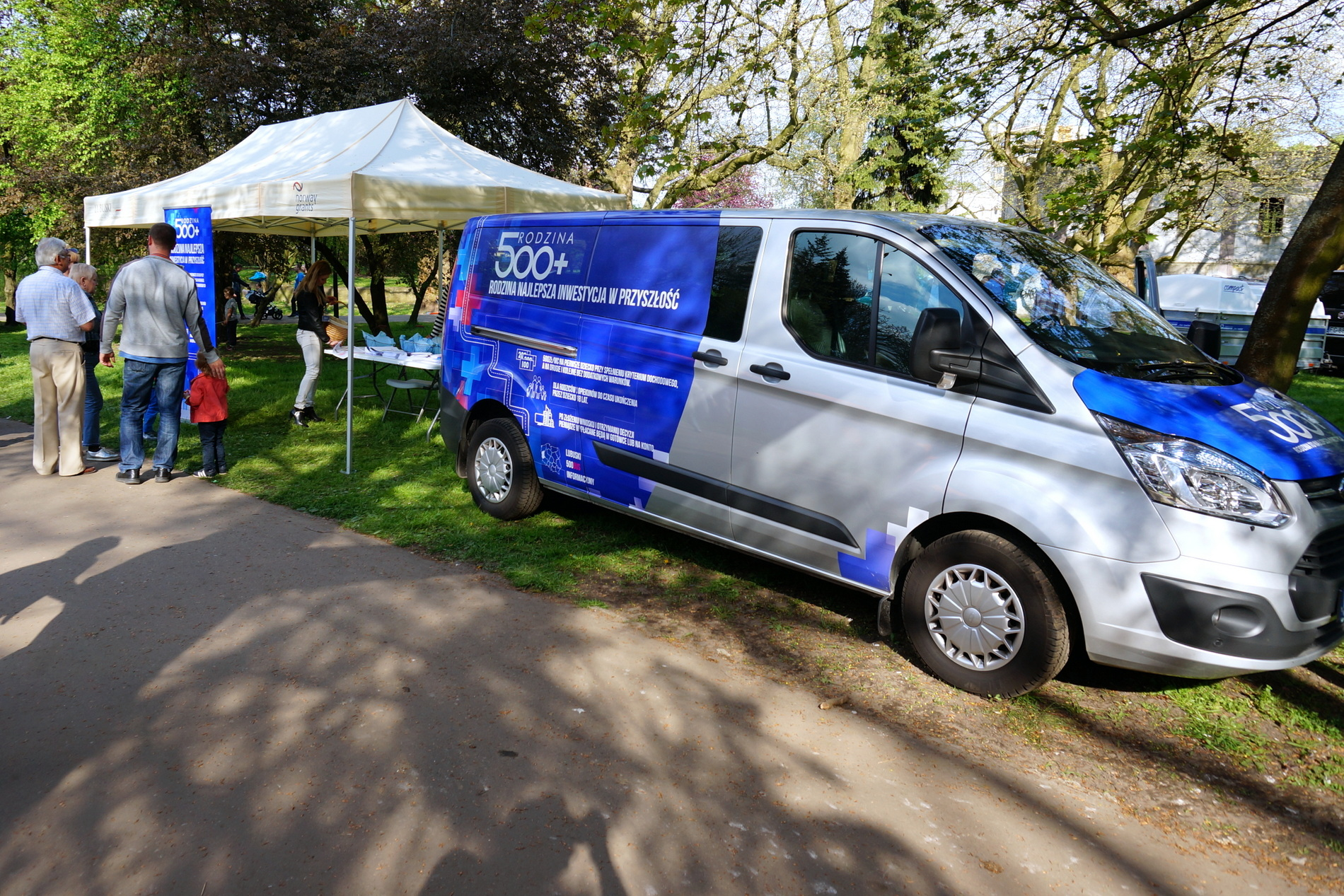 1 kwietnia 2016 r. ruszył program „Rodzina 500plus”. Tego dnia w całym kraju ruszyła także specjalna akcja promocyjno-informacyjna Urzędów Wojewódzkich: bus 500plus. Na zdjęciu bus propagandowy w Gorzowie Wlkp.